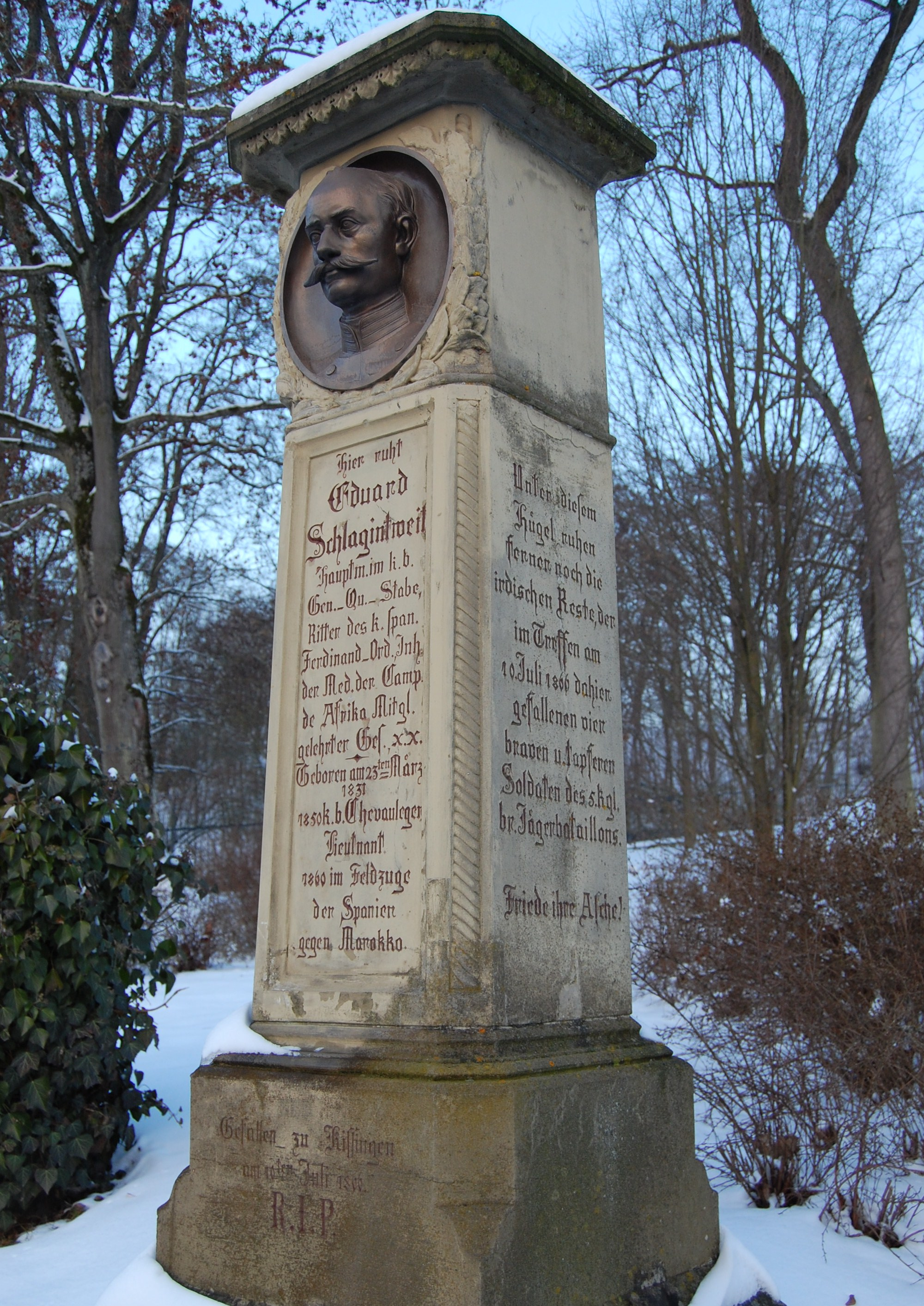 Grabmal des bayerischen Hauptmanns Eduard Schlagintweit (1831-1866) in Bad Kissingen